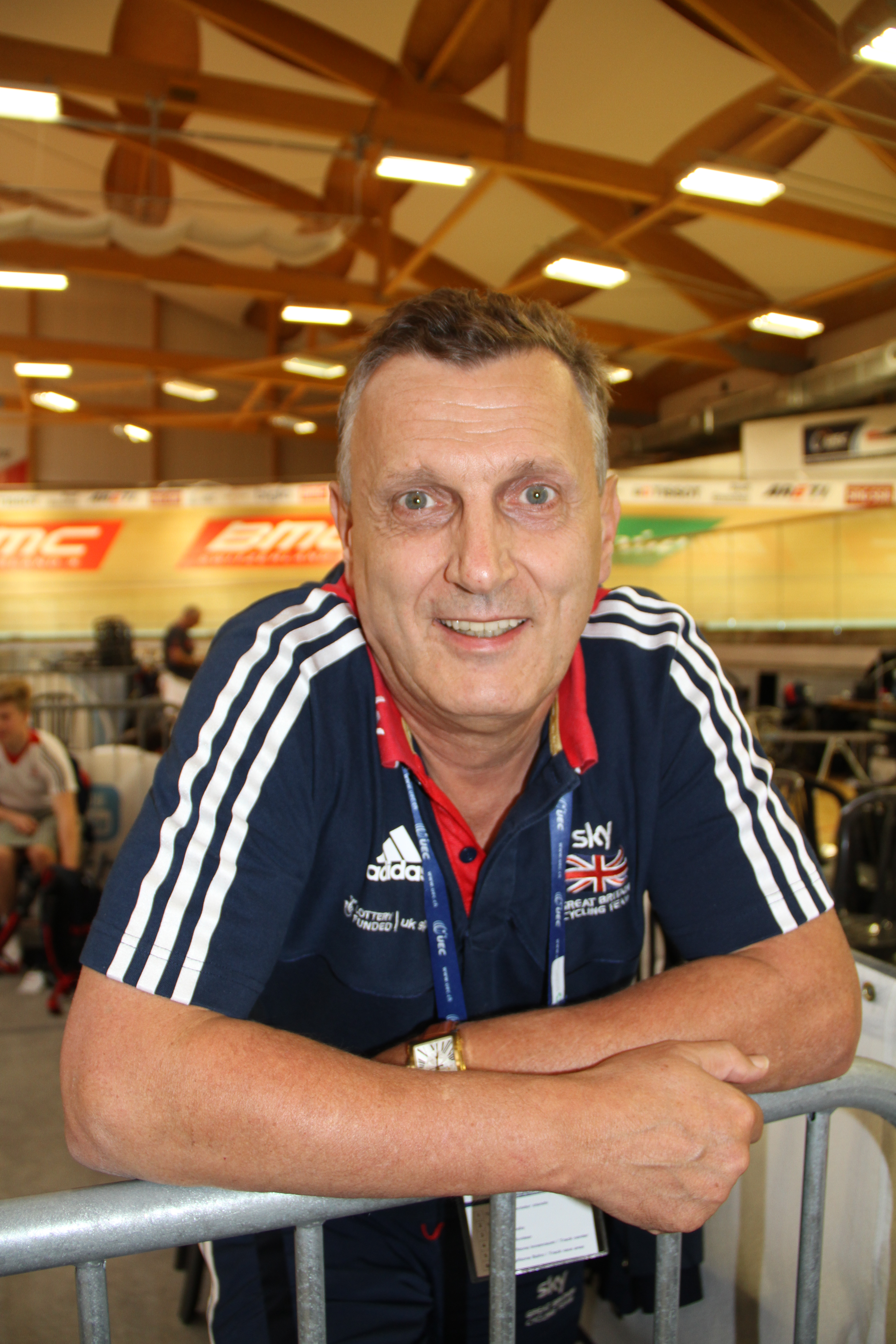 Heiko Salzwedel, deutscher Radsporttrainer The making of this document was supported by the Community-Budget of Wikimedia Germany.